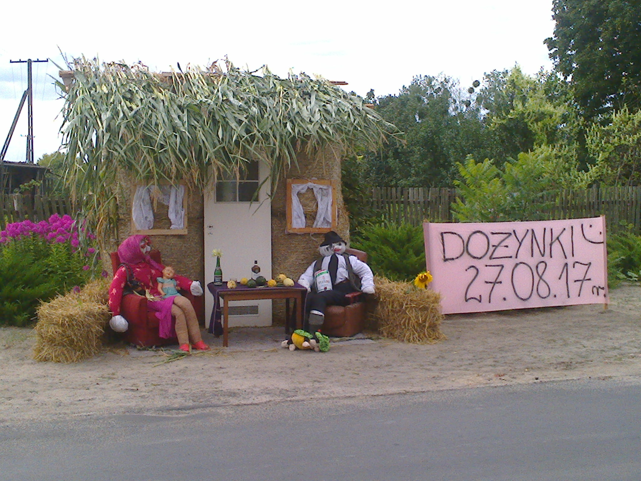 Ozdoby dożynkowe w Dobieszczyznie k Żerkowa(Wielkopolska)